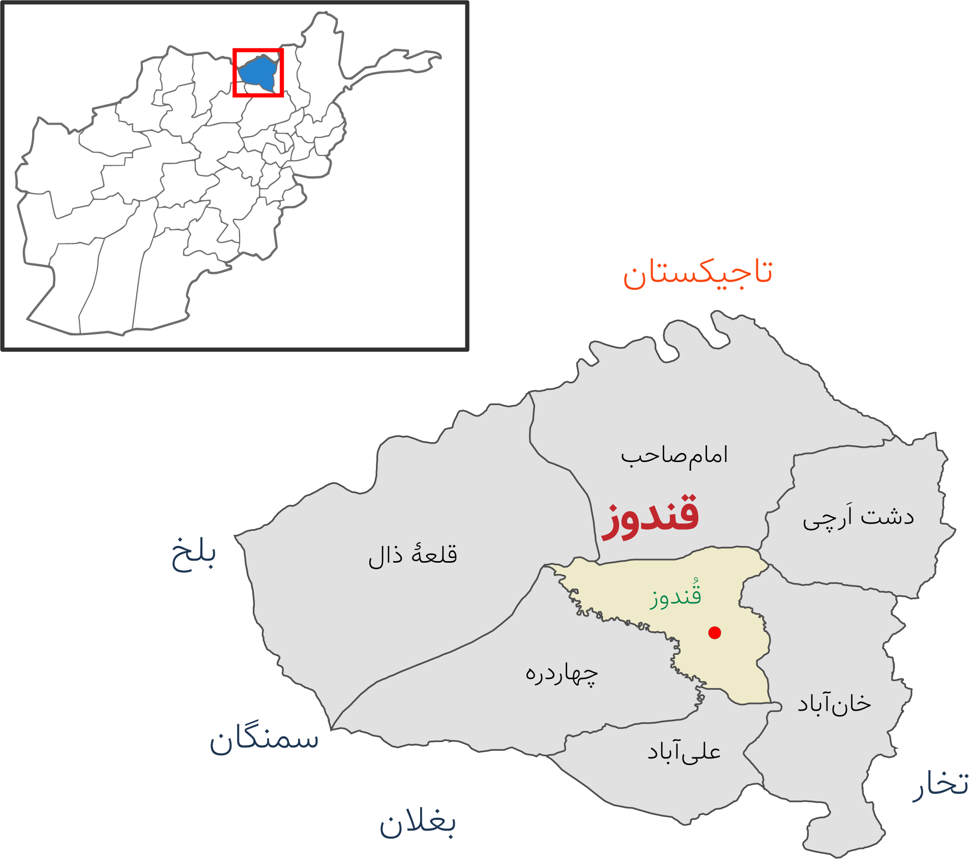 نقشه ولایت قندوز